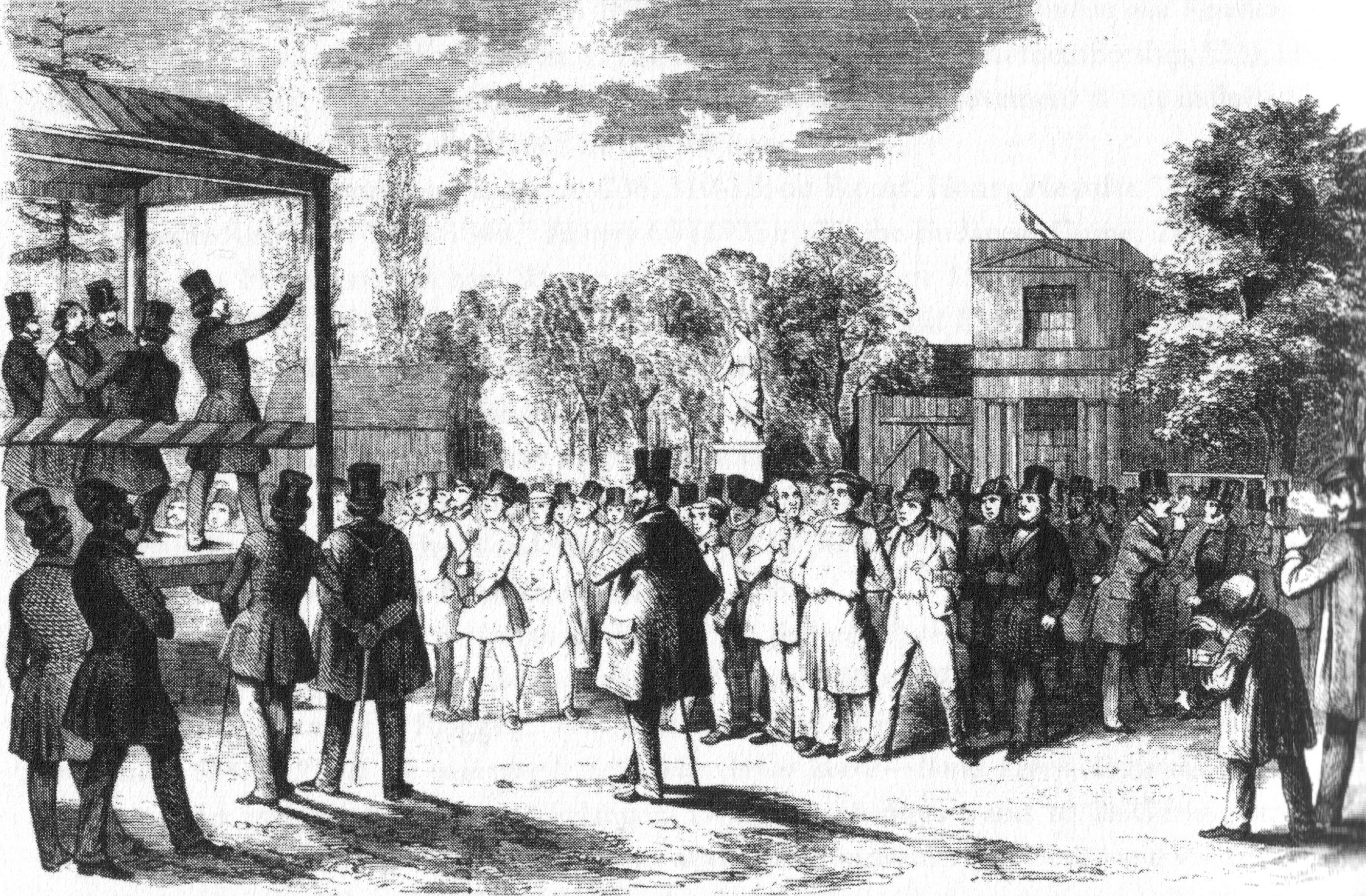 Illustrirte Zeitung, Leipzig, Nr. 253, 6. Mai 1848, 302. Versammlung in Zelten am 20. April in Berlin.